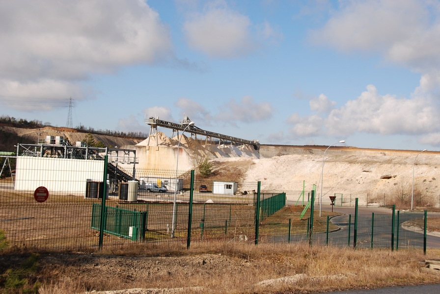 Carrière de sable de Bonnevault à Larchant (Seine-et-Marne, région Île-de-France)